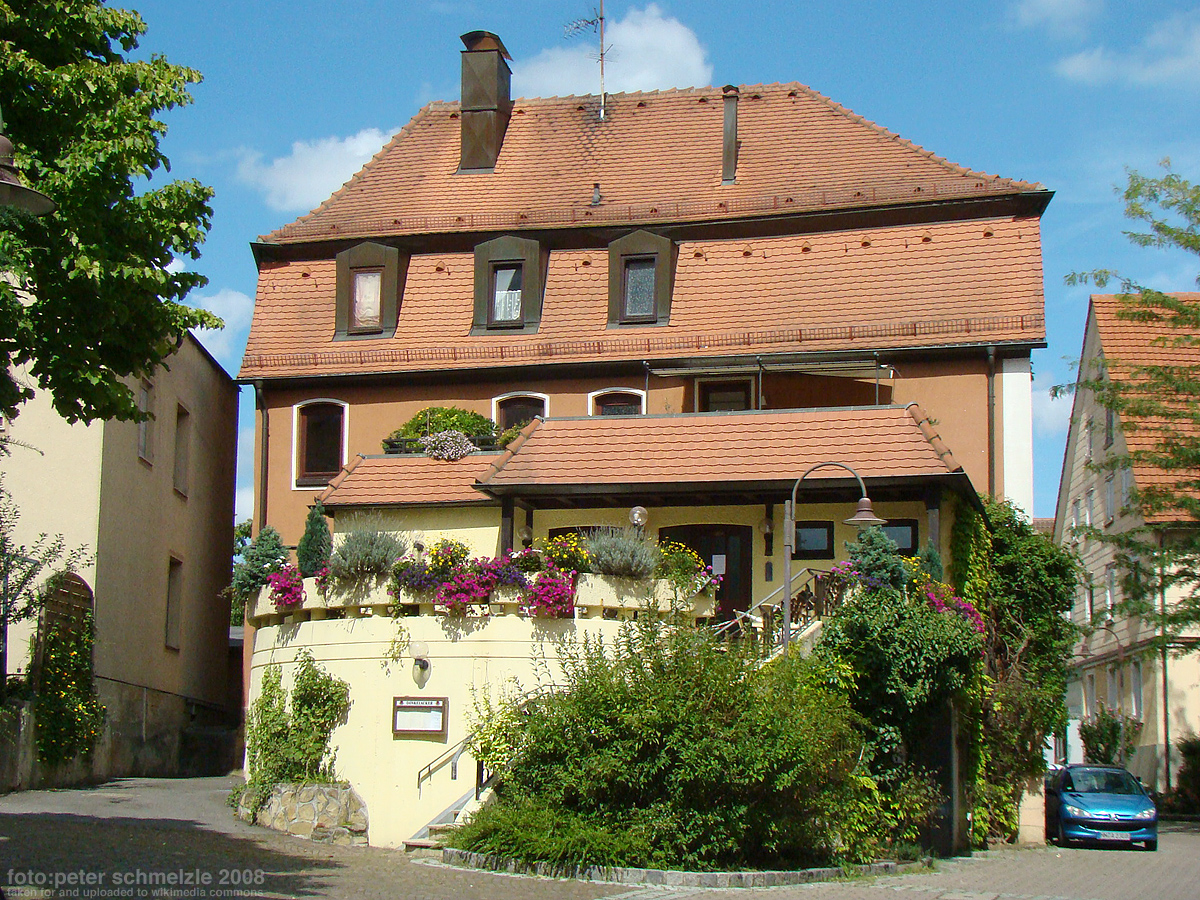 Denkmalgeschütztes Gebäude Hauptstr. 20 in Heilbronn-Sontheim